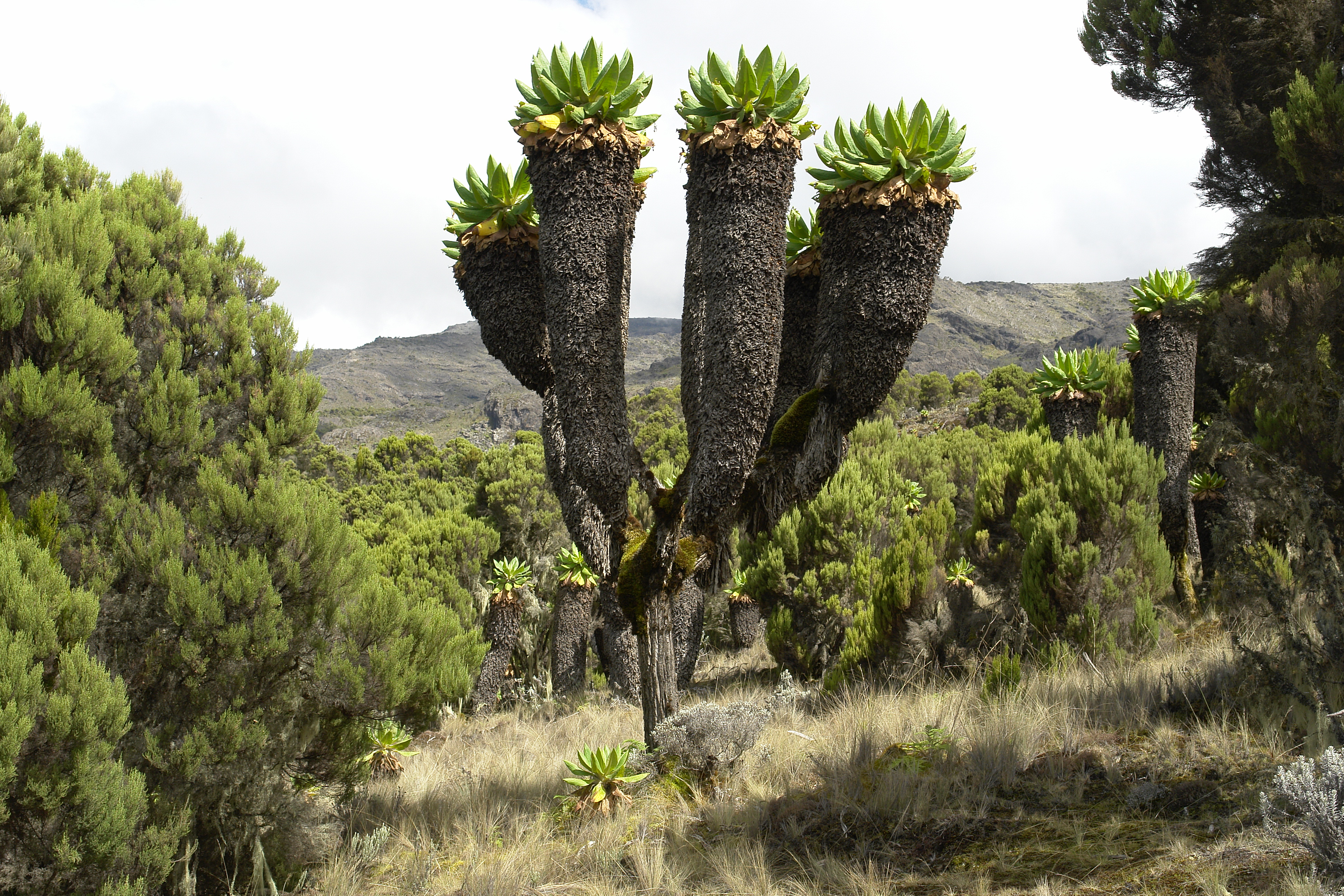 auf dem Kilimanjaro, Wachstum bis auf ca. 4500 m über NN